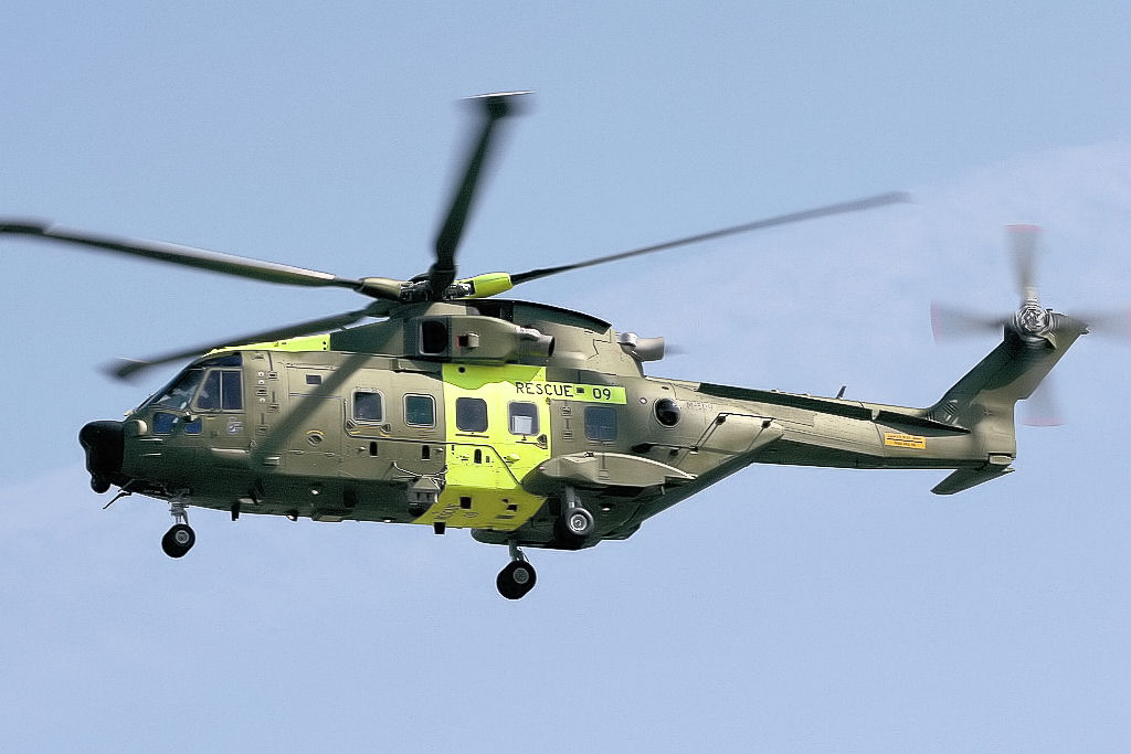 Merlin - RIAT 2006